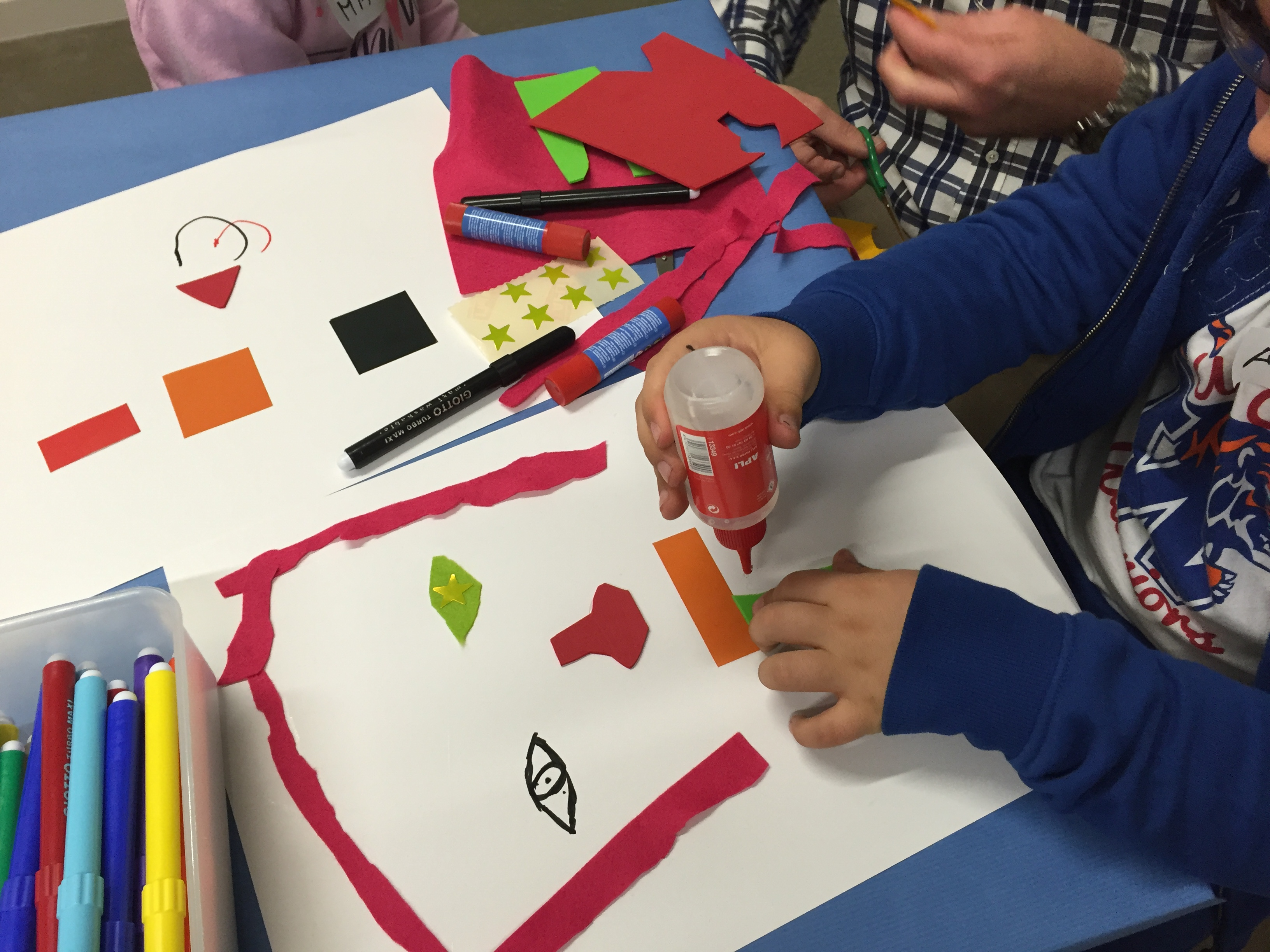 Taller infantil arte